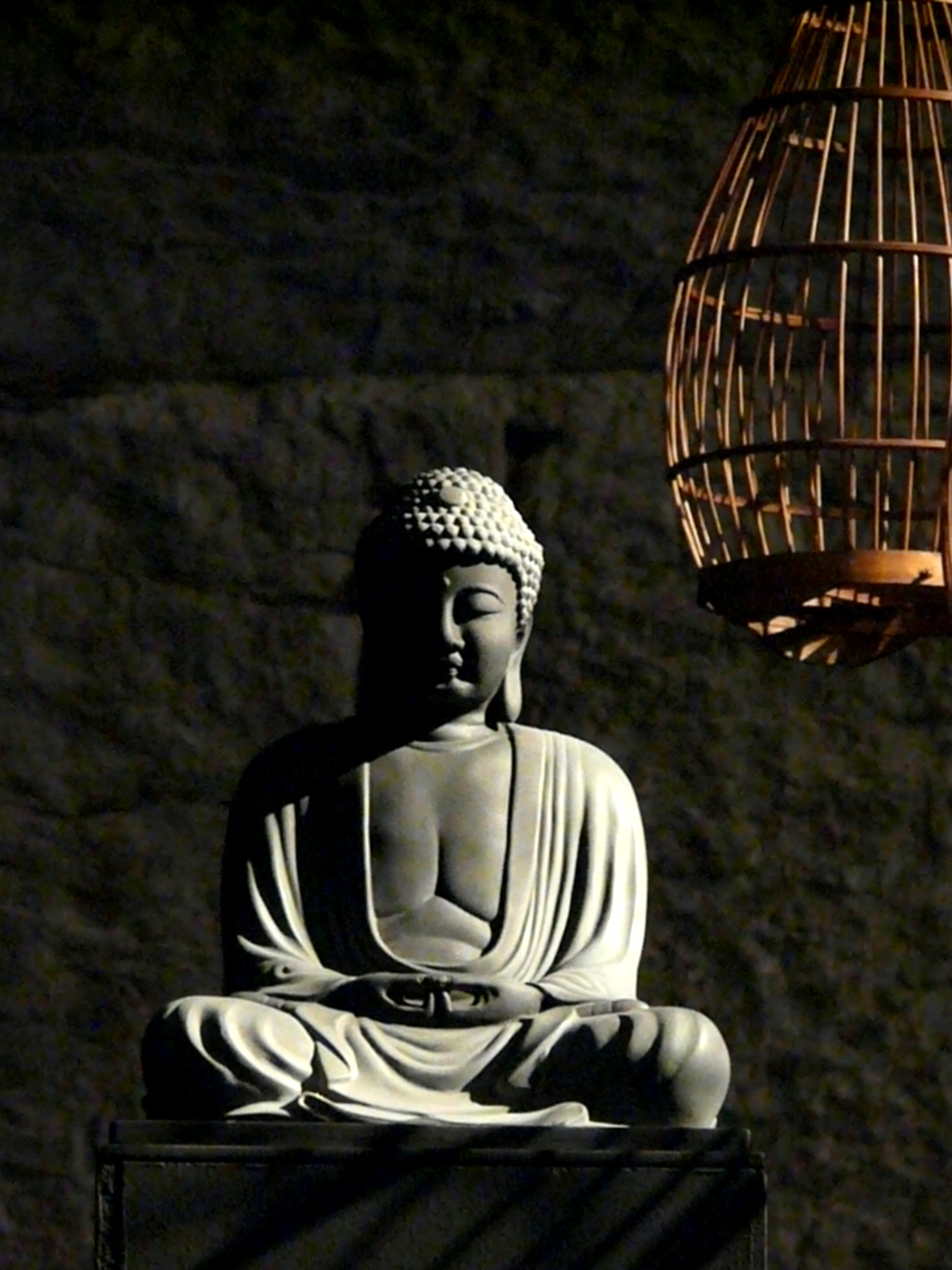 statua che rappresenta il Buddha